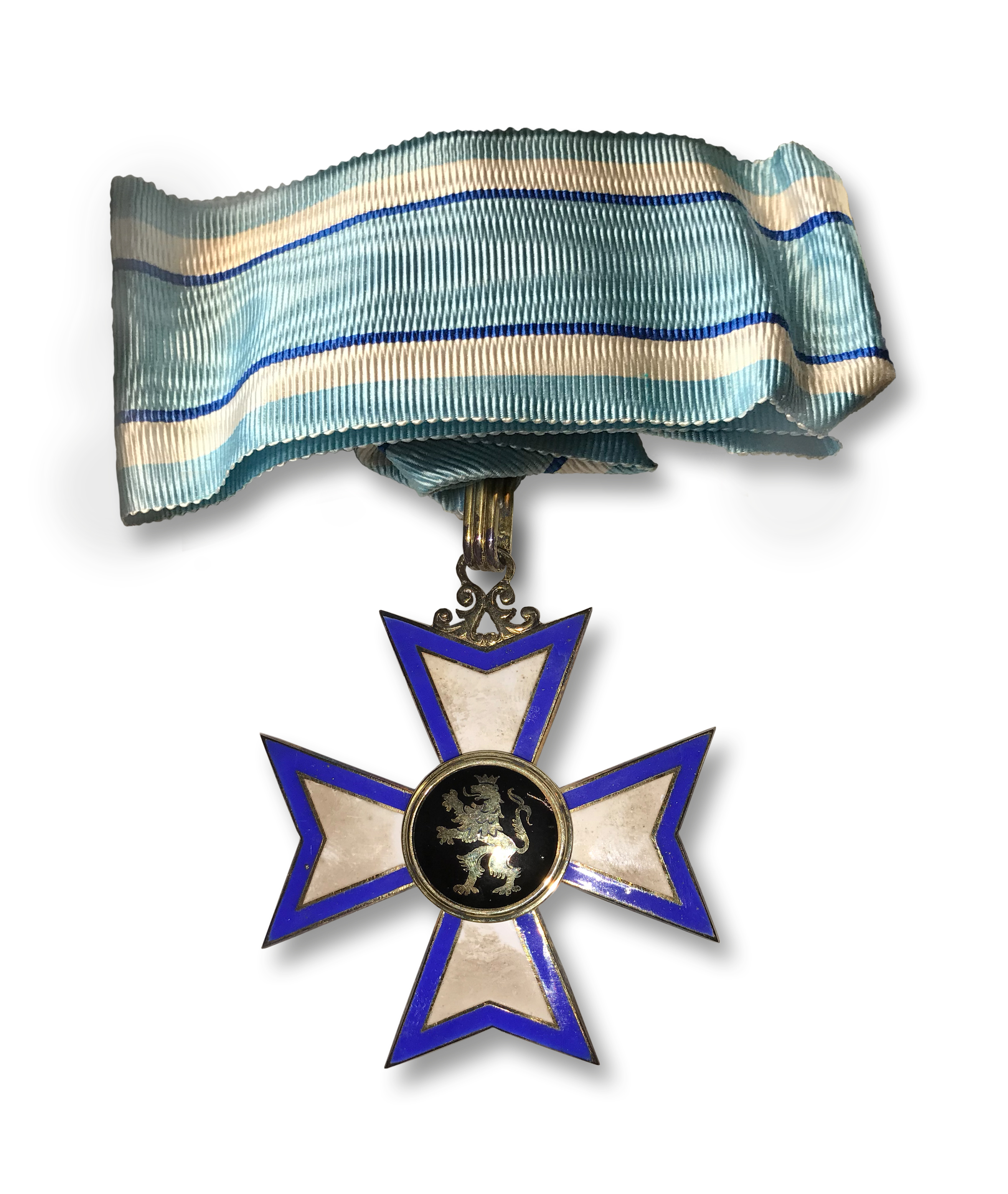 Bayerischer Verdienstorden in der Herrenausführung (Revers)